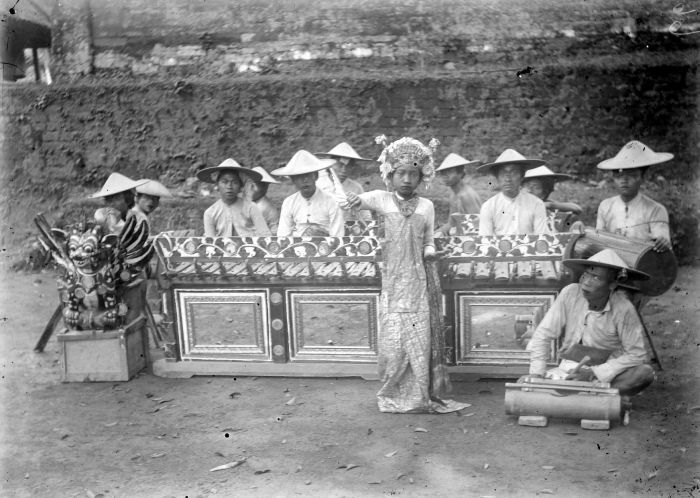 Negatief. Dansvoorstelling